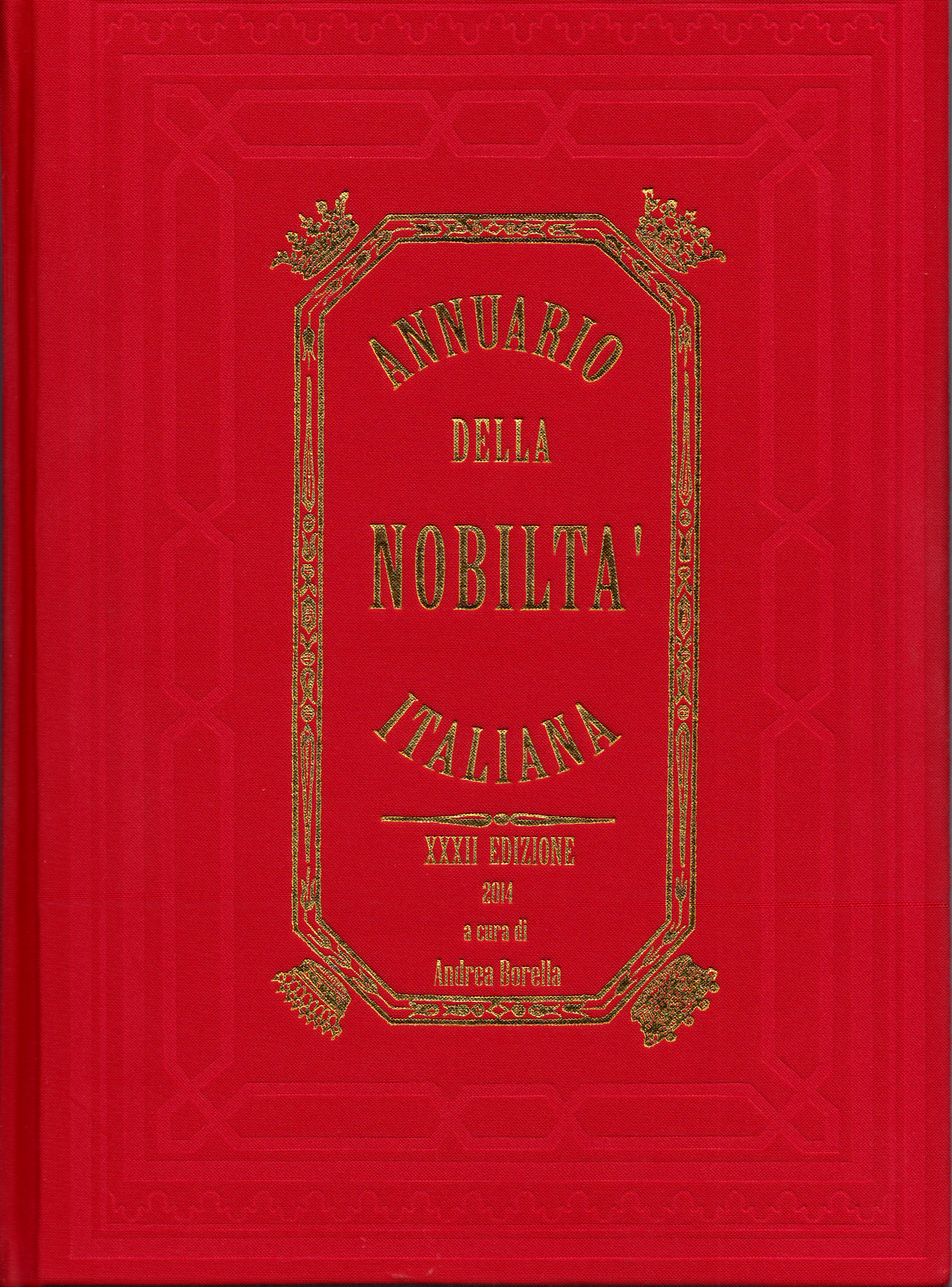 Copertina del periodico "Annuario della Nobiltà Italiana", XXXII Edizione, 2014, a cura di Andrea Borella